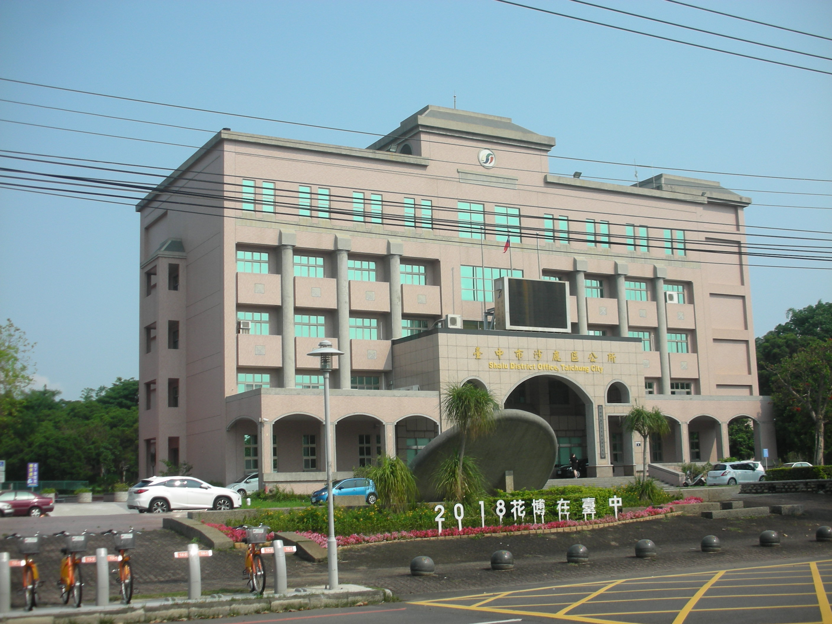 台中市沙鹿區公所，位於鎮政路8號。